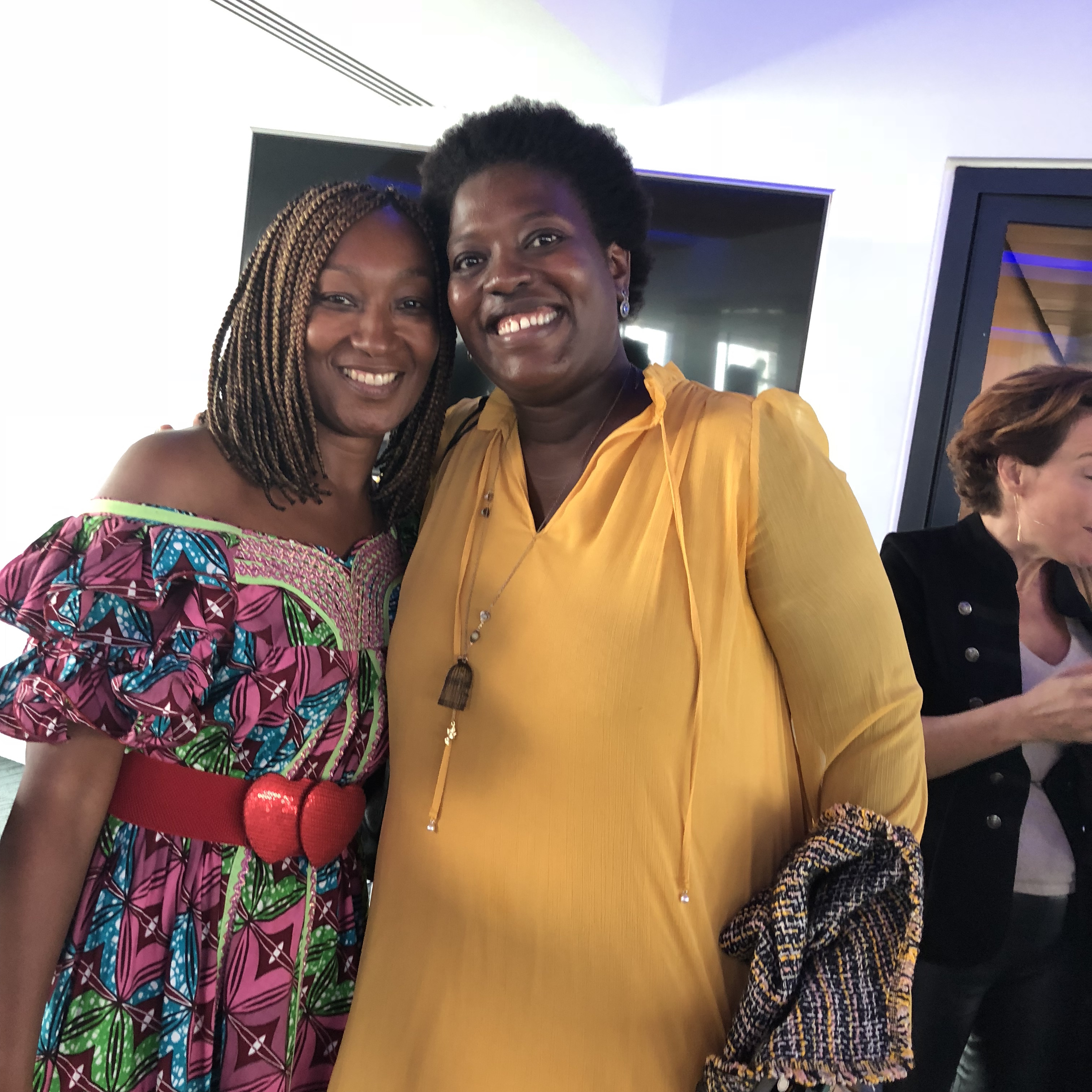 Photo prise à l'Université d'été du Féminisme 2018 organisée par le secrétariat d'État à l'égalité entre hommes et femmes à Paris les 12 et 13 septembre 2018